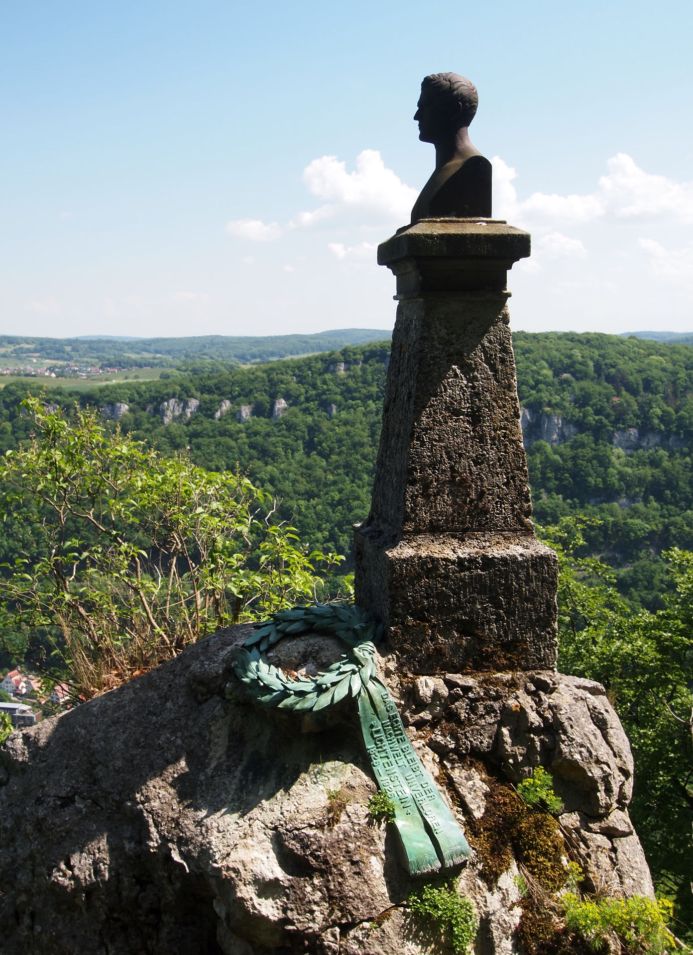 Wilhelm-Hauff-Denkmal bei Schloss Lichtenstein DAS ECHTE BLEIBT DER NACHWELT UNVERLOREN ›LICHTENSTEIN‹ 1826–1926